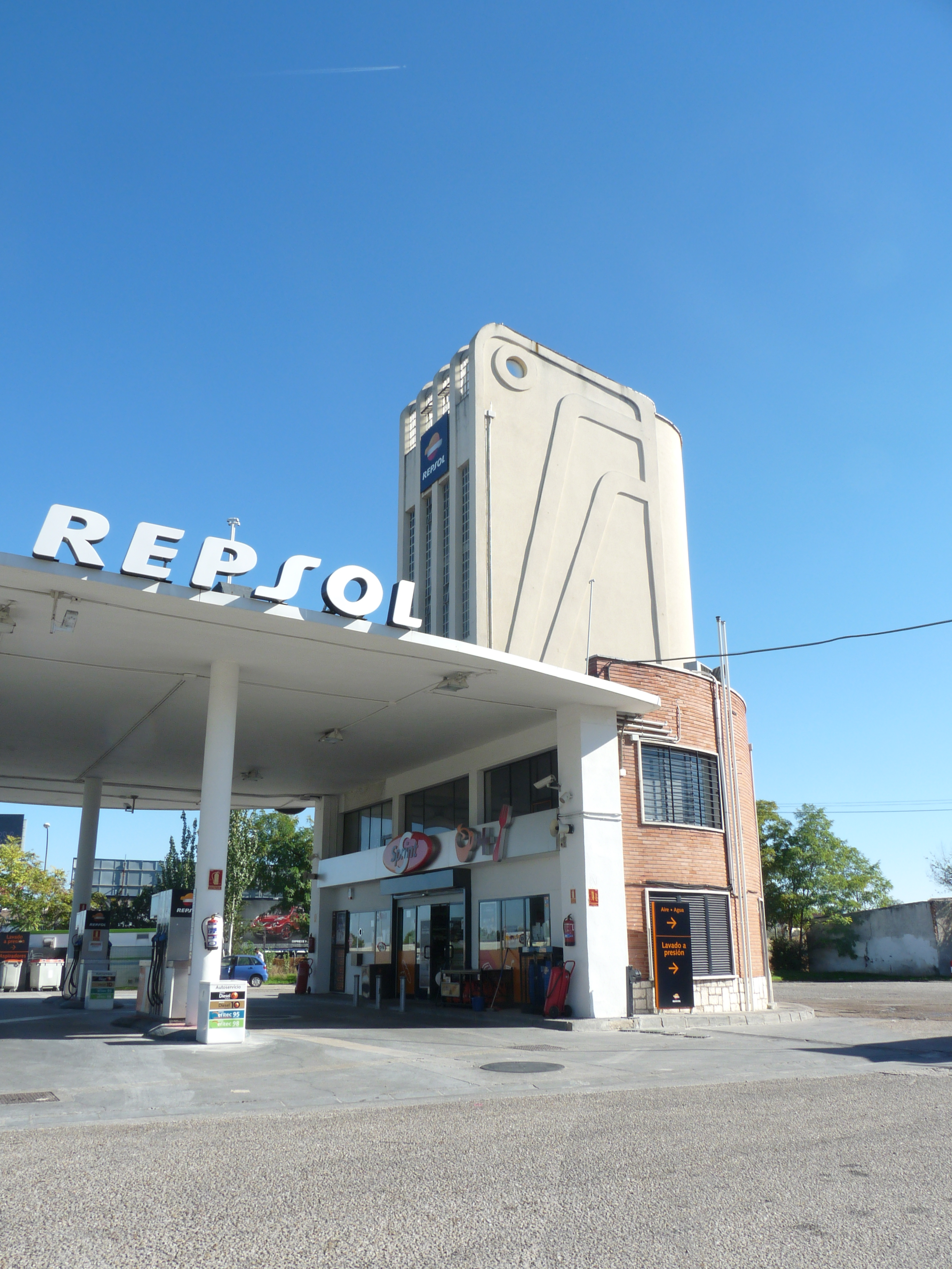 Gasolinera en el número 288 de la avenida de Aragón, Madrid.